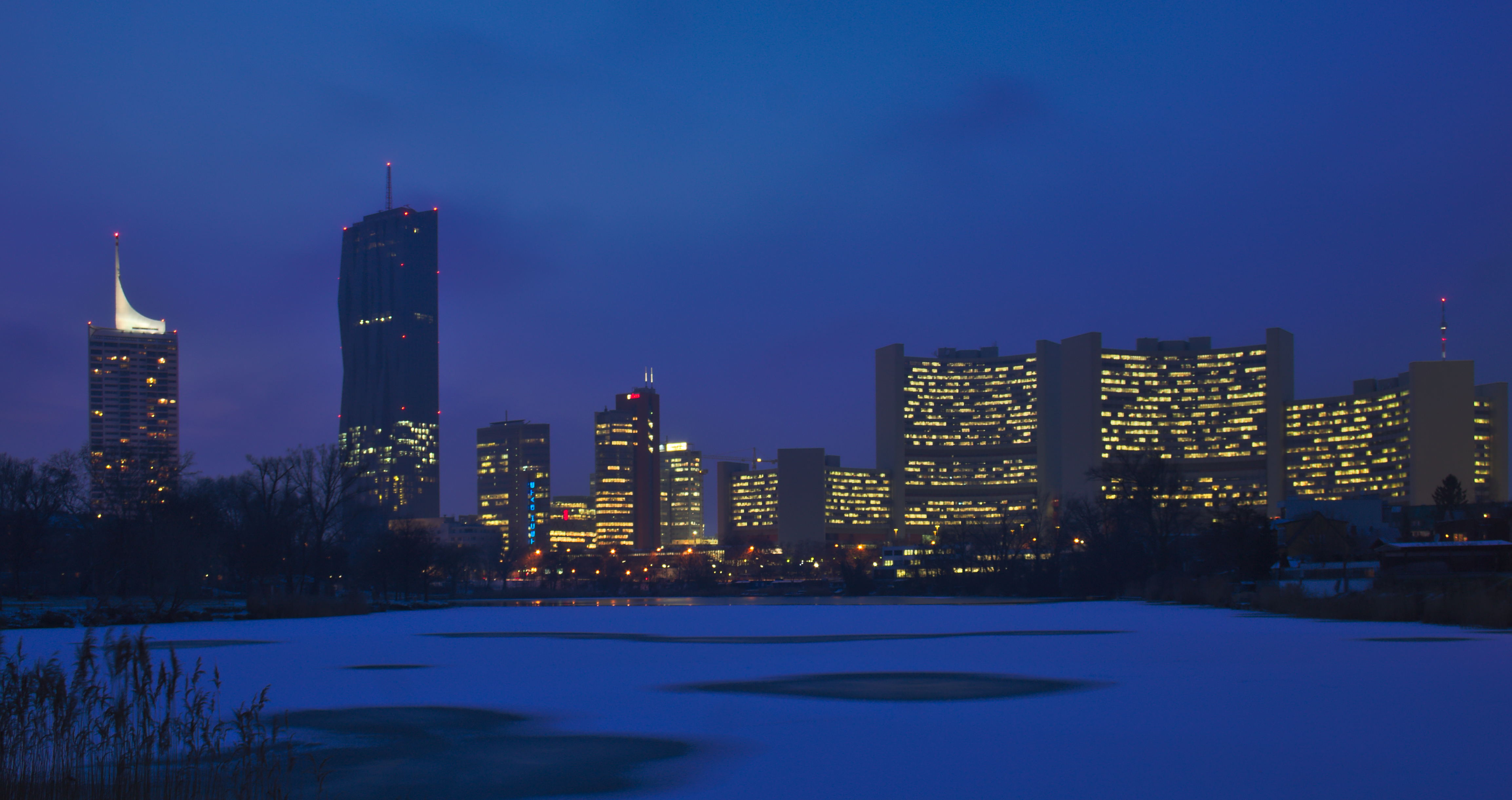 Donau City und Vienna International Centre (UNO-City) bei Nacht, im Vordergrund das zugefrorene Kaiserwasser